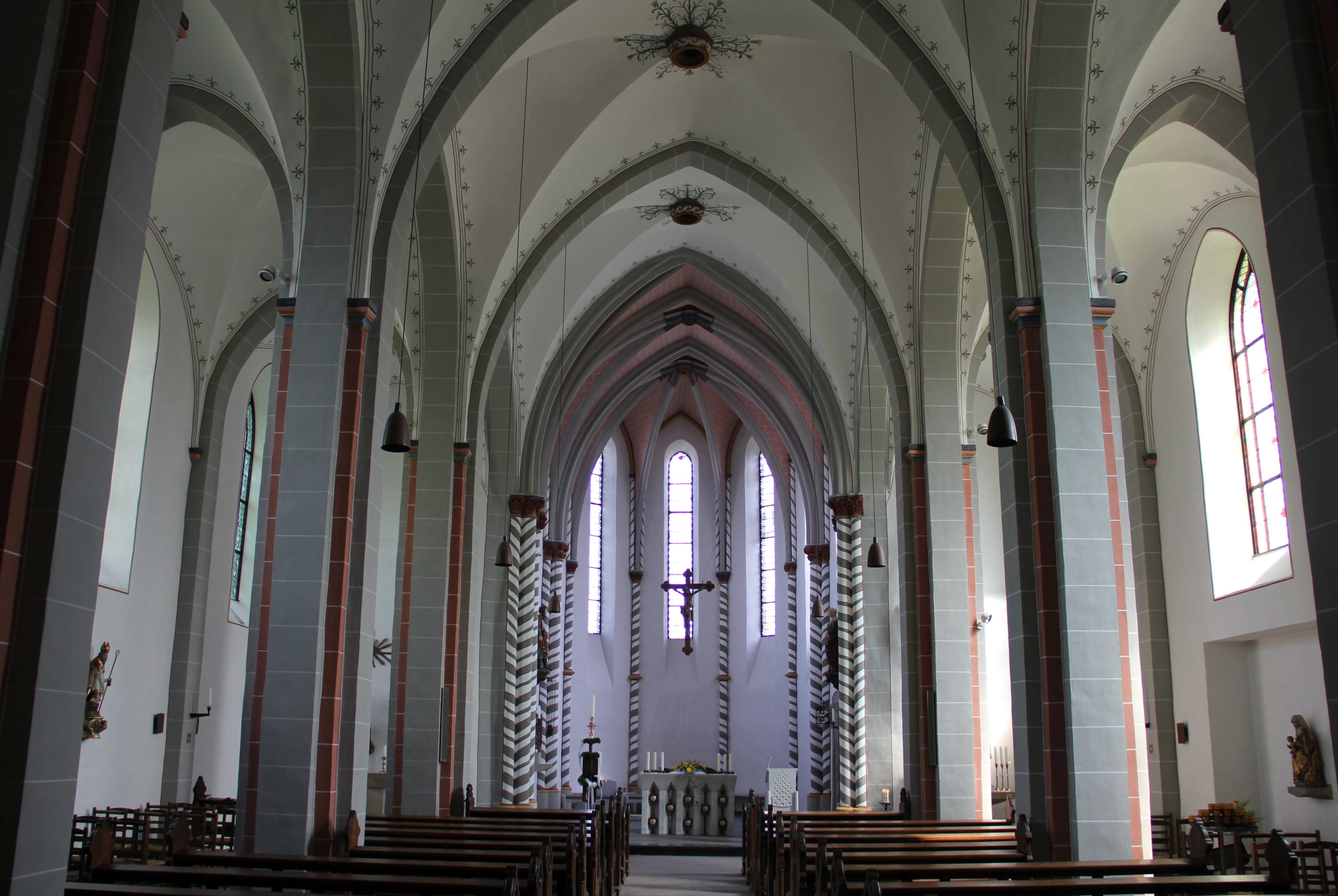 Blick auf den Altar in der katholischen Pfarrkirche Sankt Mariä Geburt in Lohmar - Birk